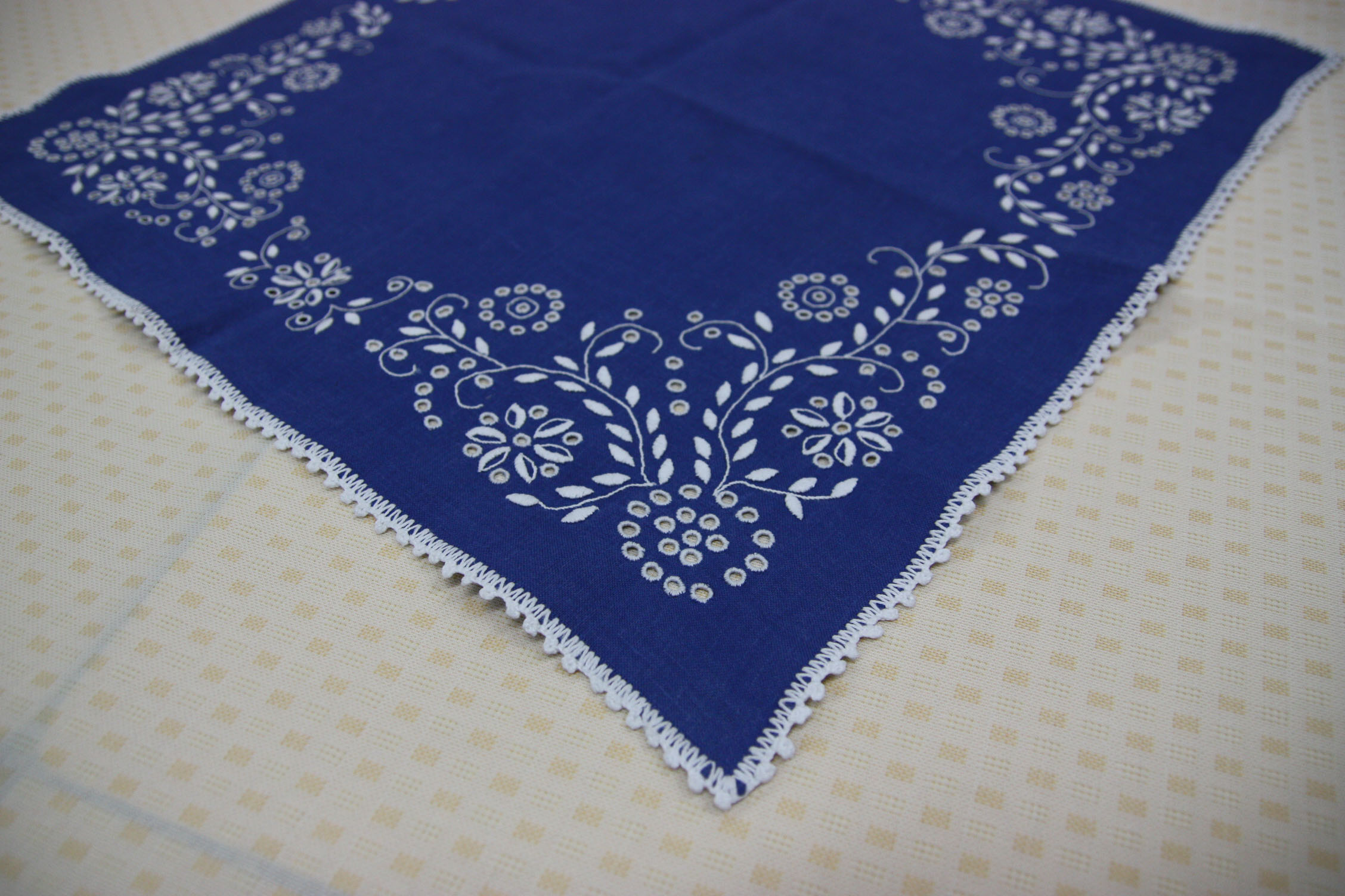 Zdjęcie przedstawia serwetę ozdobioną haftem kujawskim. Hafciarka, Alicja Jakubowska, posiada tytuł twórcy ludowego. Fotografię wykonano podczas zajęć animacyjnych dla pokolenia 50+ w ramach projektu Polska Cyfrowa Równych Szans w Gminnej Bibliotece Publicznej w Rojewie.